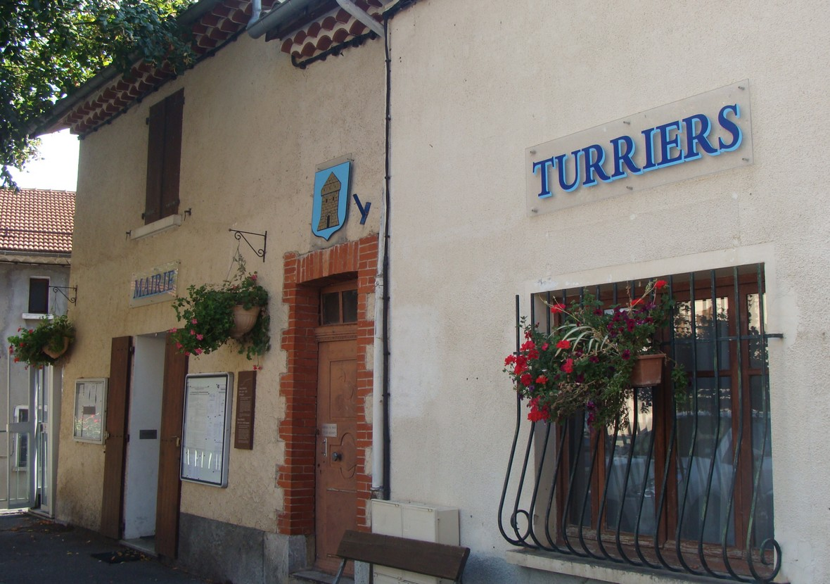 La mairie de Turriers (Alpes-de-Haute-Provence).